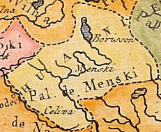 Беларуская (тарашкевіца): Фрагмэнт мапы Рэчы Паспалітай, на якім Менск (Miensk) і Менскі павет (Mienski paviet) значацца як Menski і Pal. de Menski адпаведна